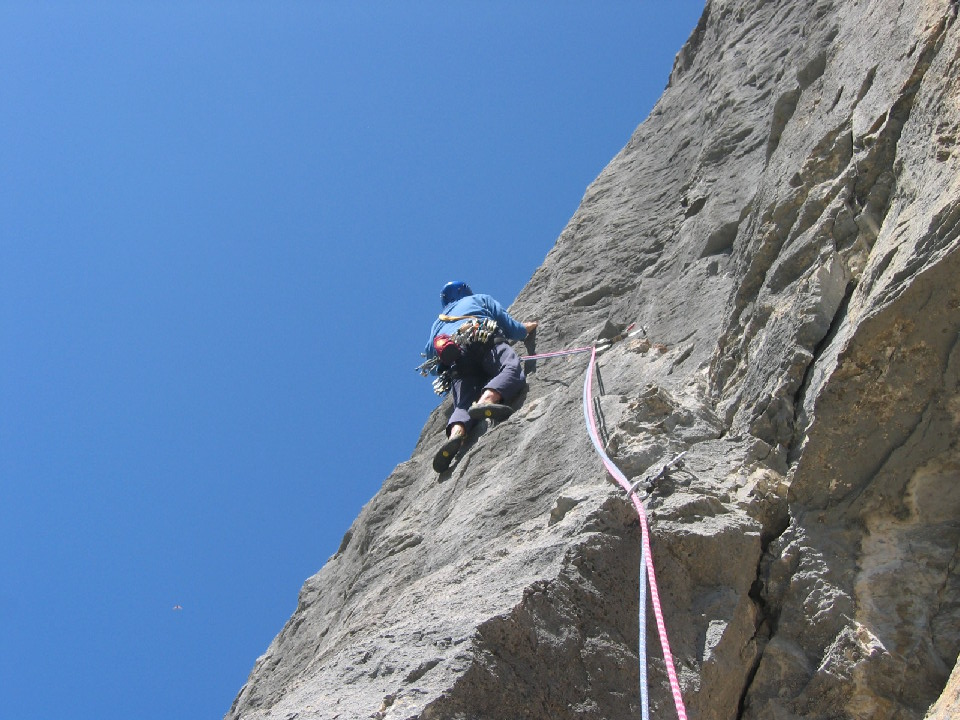 L4 Superbe longueur en 6b+